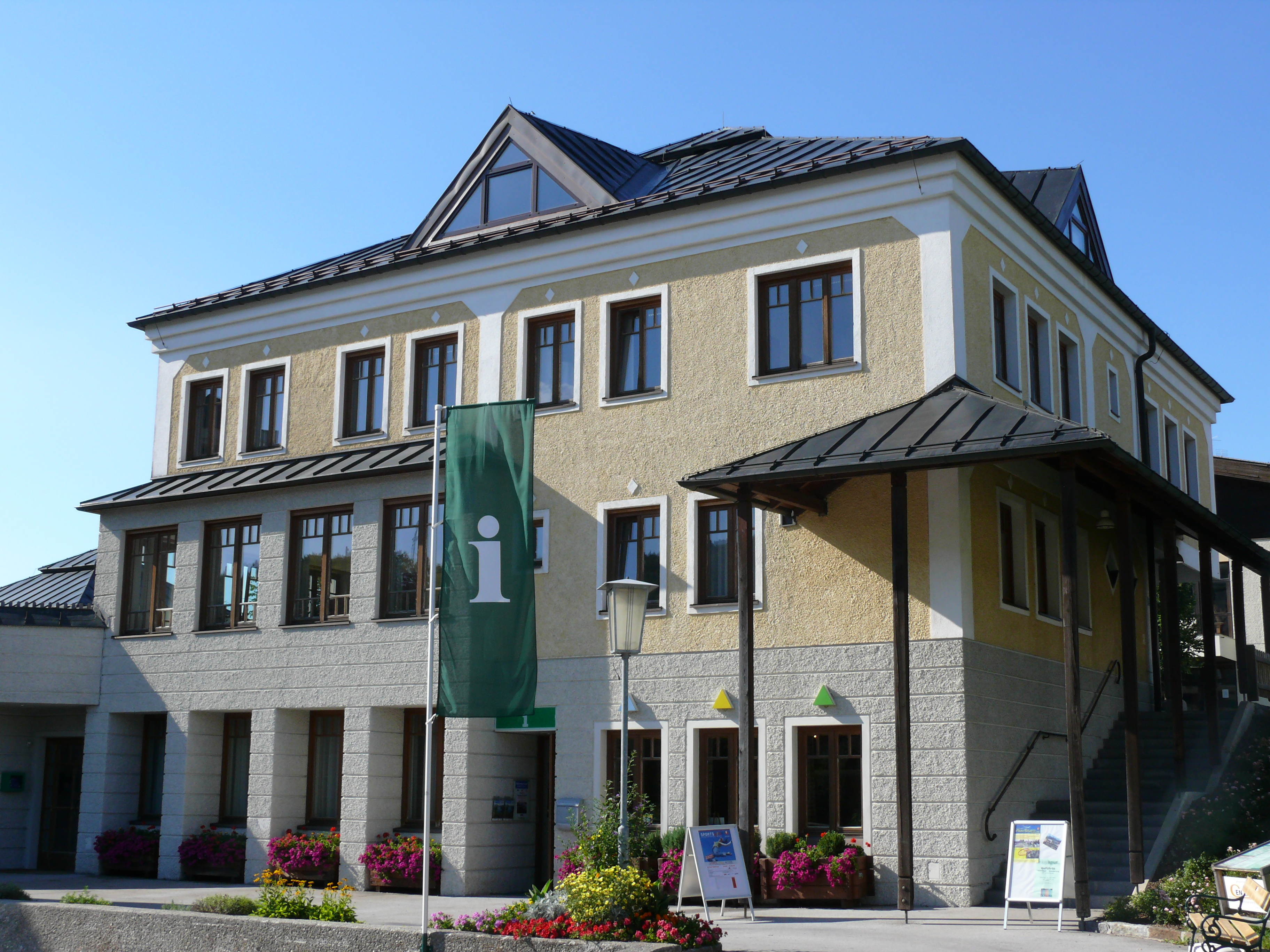 Hof bei Salzburg, Gemeindehaus (municipal offices)